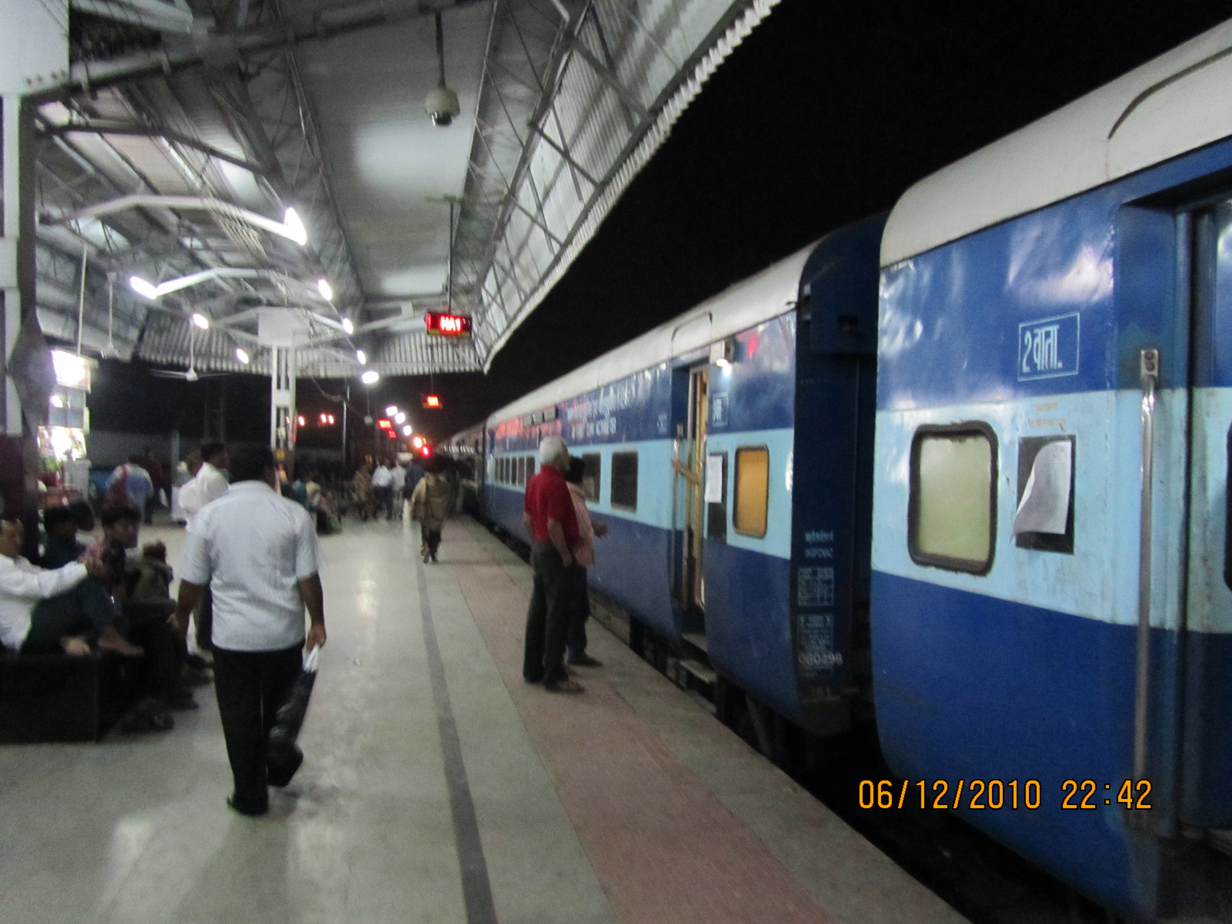 वर्ग:विकिपीडिया चित्रे